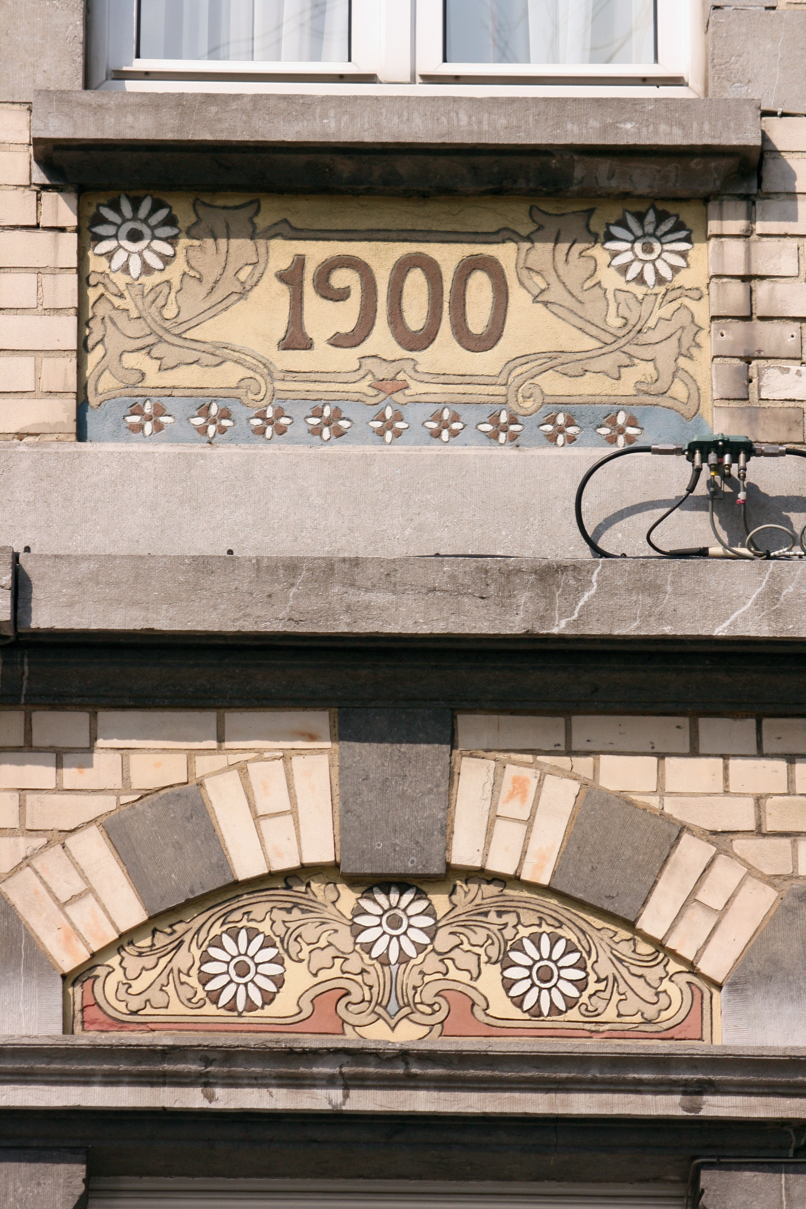 10, Place Louis Morichar, Saint-Gilles (Brussels). Sgraffito par Gabriel van Dievoet (1875-1934)